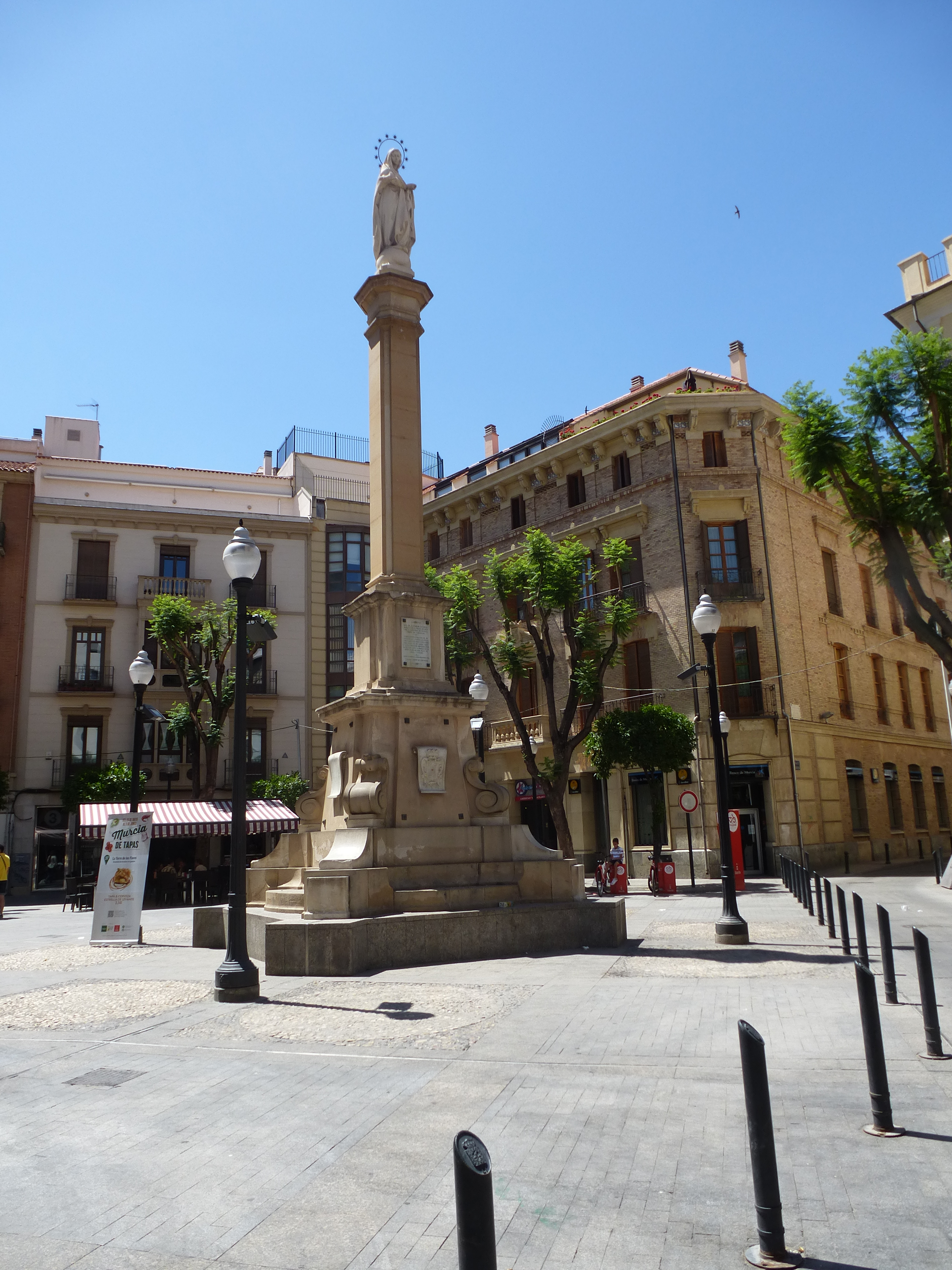 plaza catalina